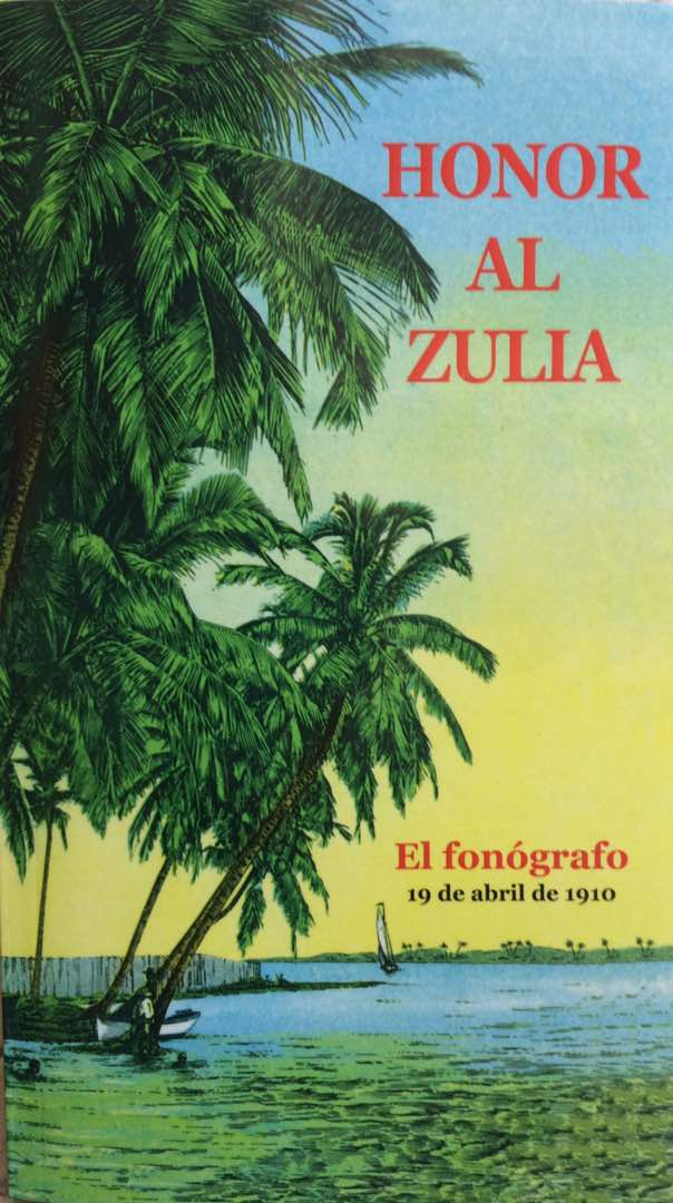 Portada del libro "Honor al Zulia, editado en la "Imprenta Americana" de Maracaibo, propiedad de Eduardo López Rivas. El libro recopila los mensajes recibidos por López Rivas y el equipo del diario "El Fonógrafo", en reconocimiento a la edición especial del 19 de abril de 1910. La edición de gala de 1910 se hizo para conmemorar el centenario de la independencia de Venezuela.